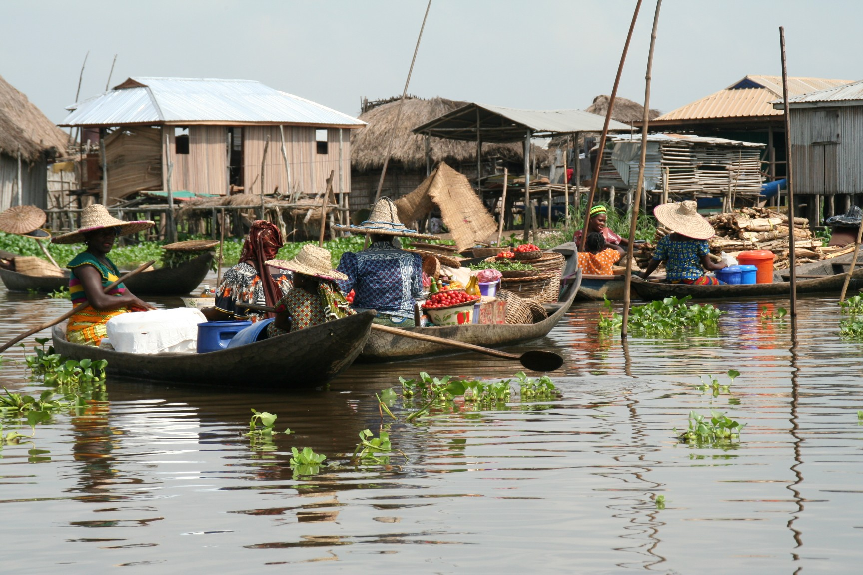 Markt in Ganvié